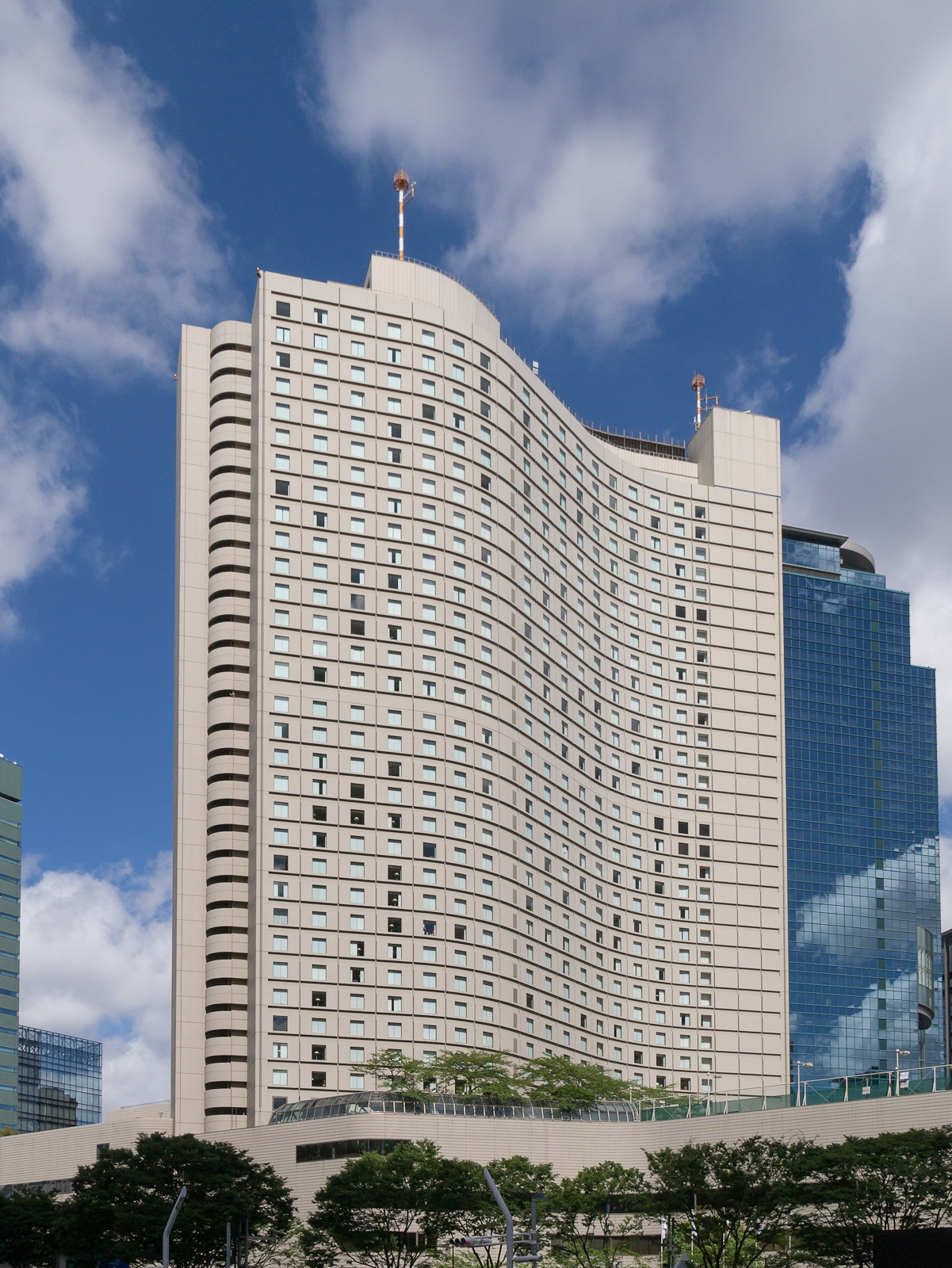 新宿国際ビル、ヒルトン東京。